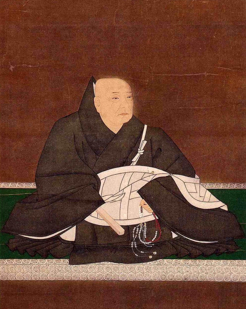 Image:Rennyo5.jpgの拡大画像